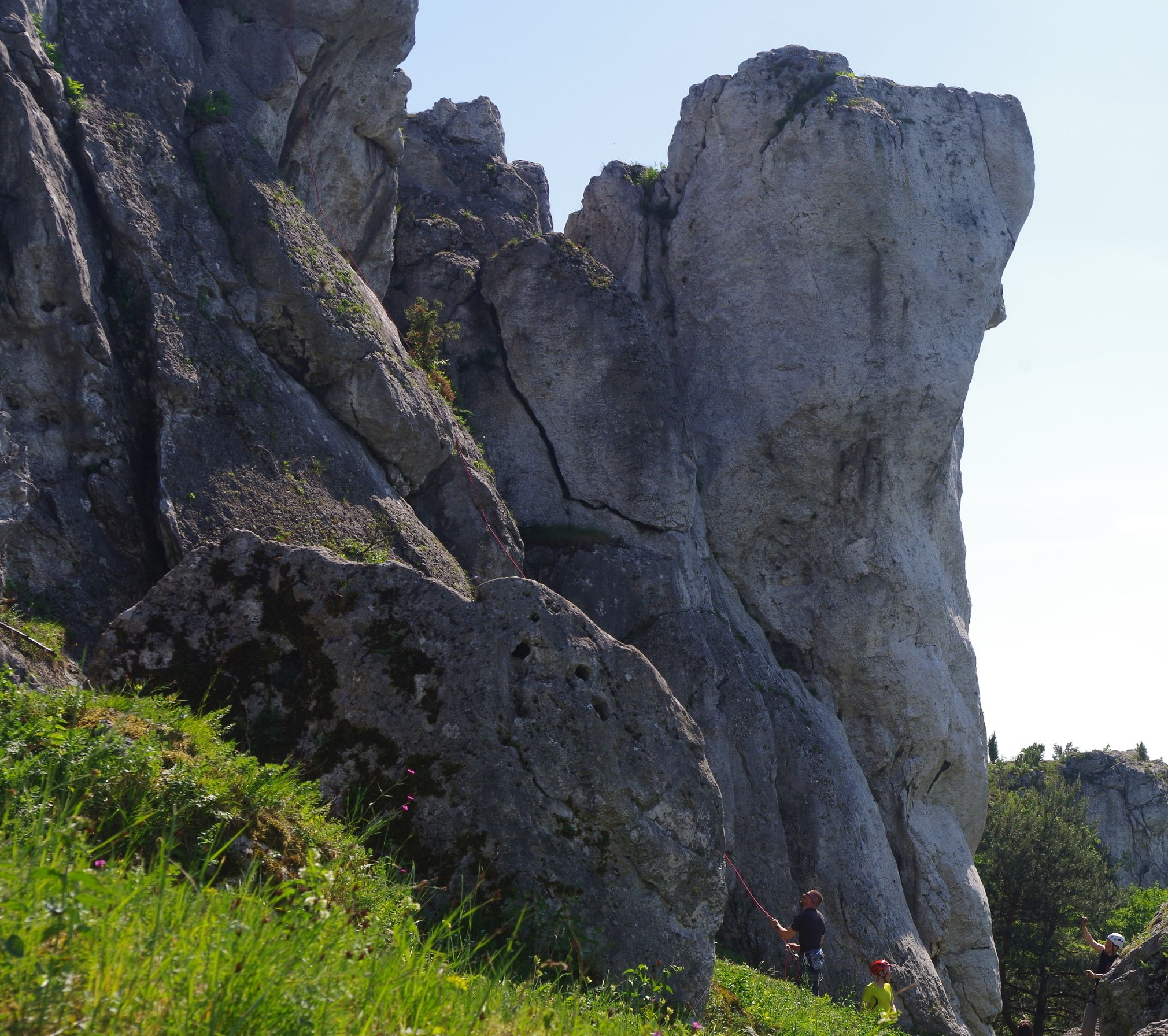 Skała Dziewica w Grupie Dziewicy na wzgórzu Cegielnia koło Olsztyna